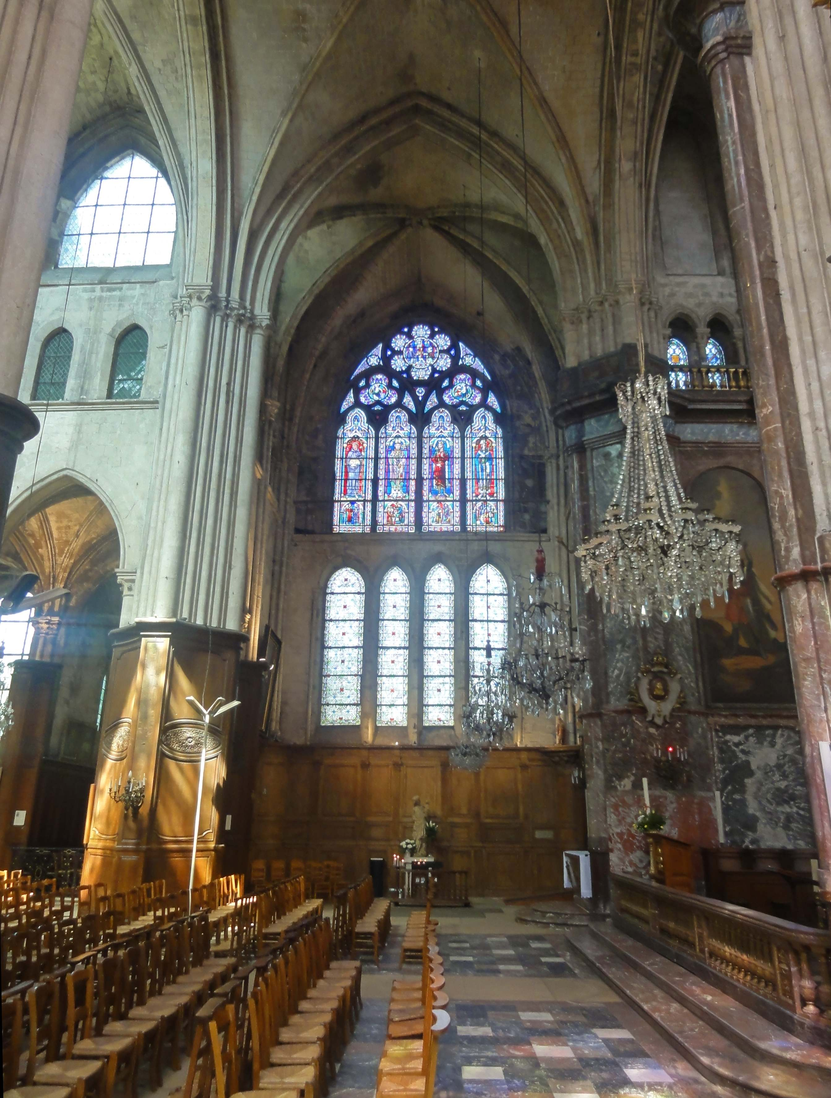 Transept - voir le titre du fichier.